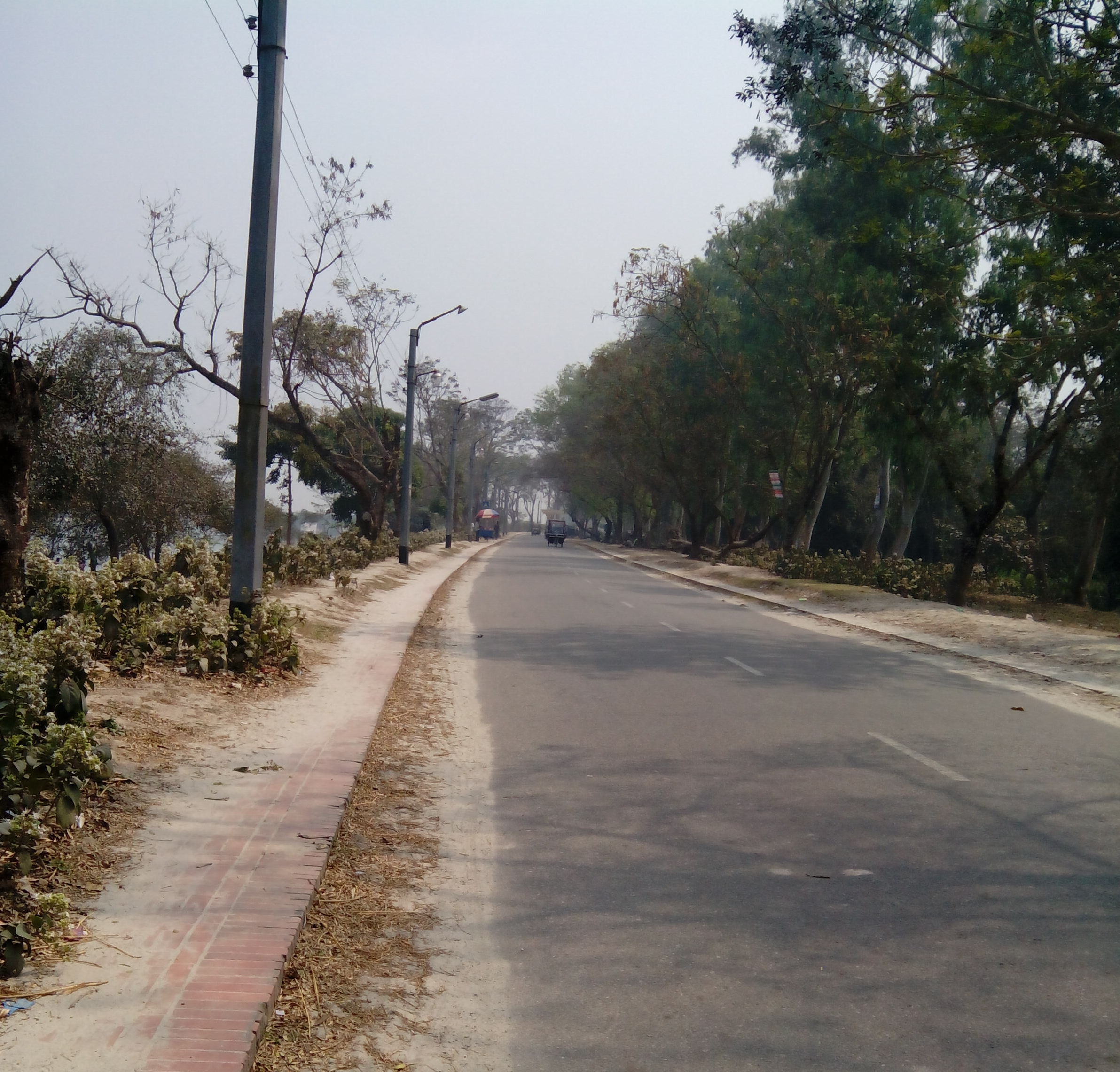 তিস্তা ব্যারেজের নিকটে আর৫৬০ (পাগলাপীর-তিস্তা ব্যারেজ- বড়খাতা সড়ক)